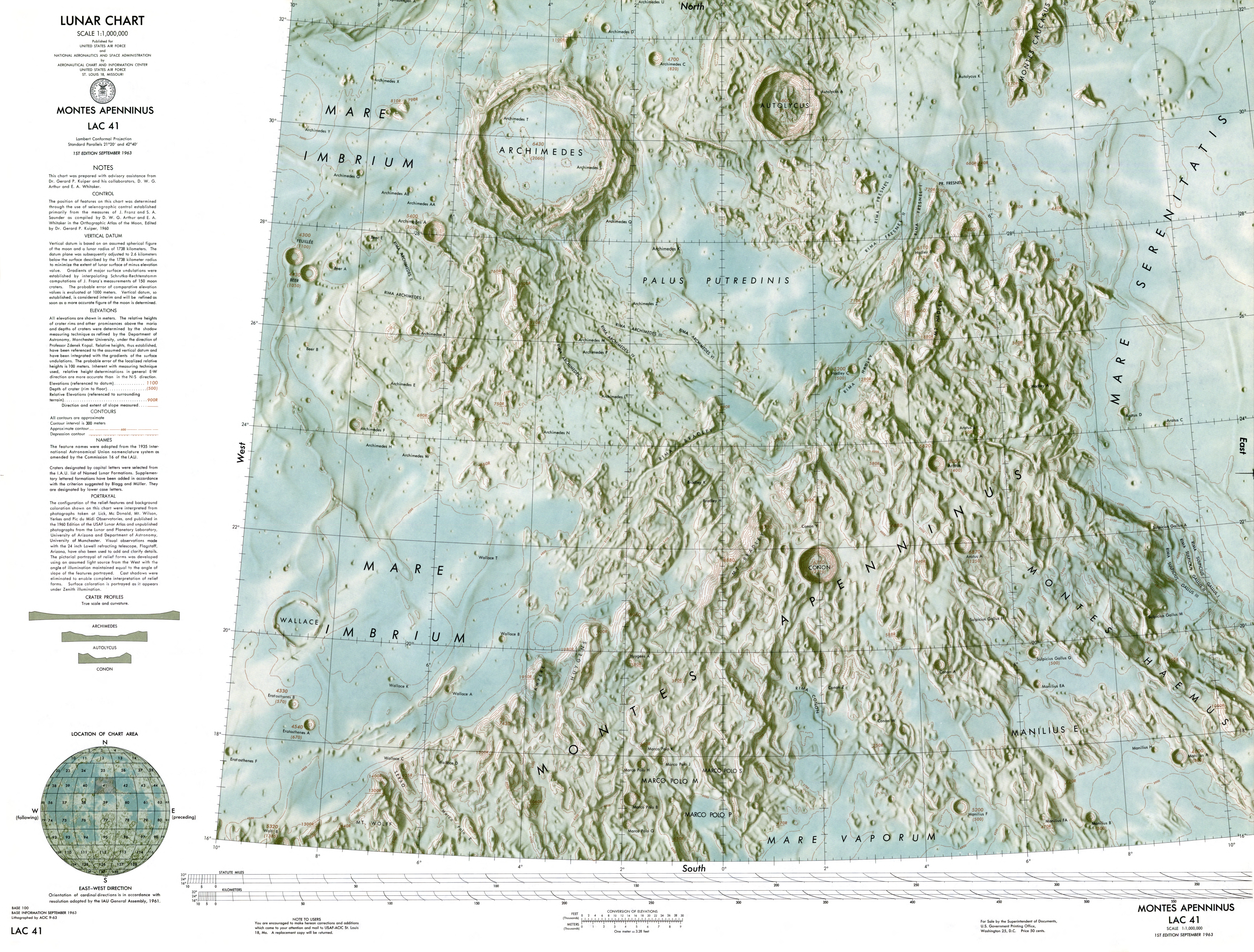 1:000 000 scale lunar chart - Montes Apenninus (LAC 41)